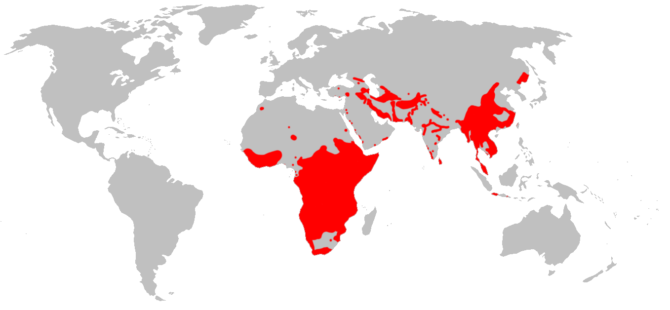 Aire de répartition du léopard selon la carte de l'UICN.